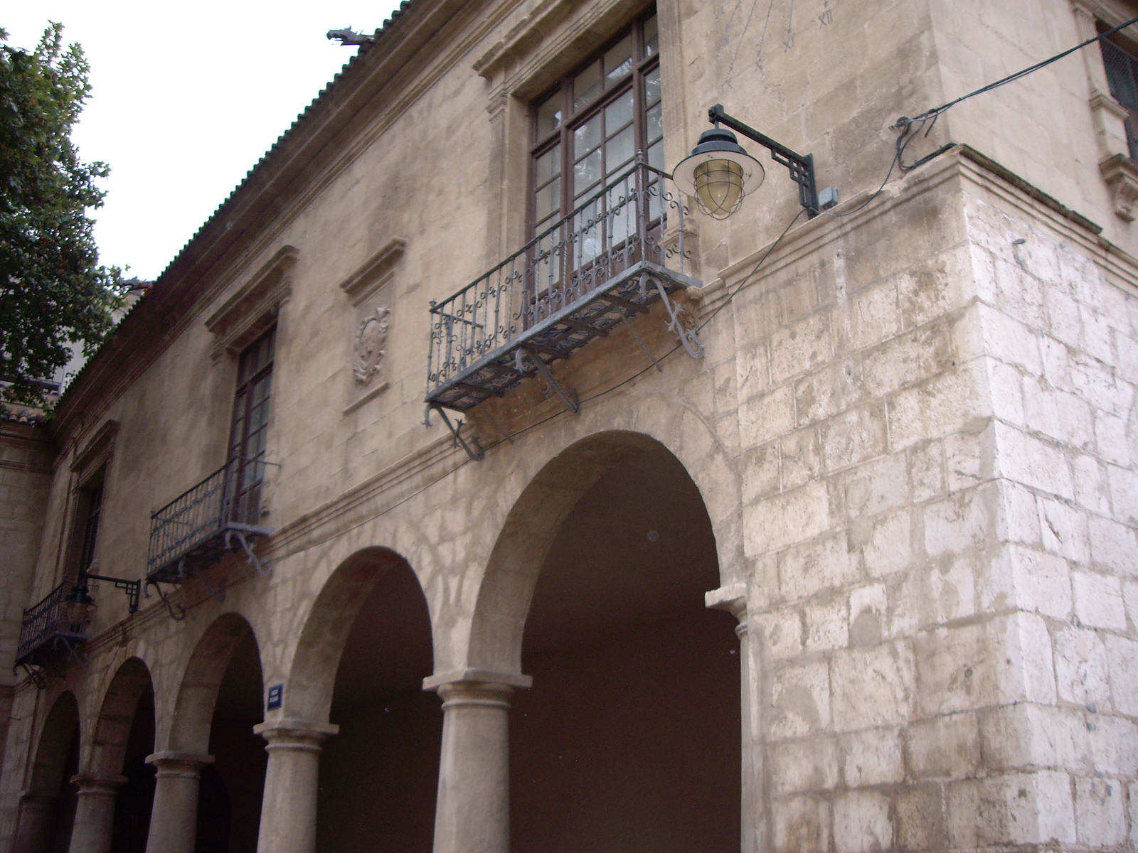 Museu Arqueològic Municipal d'Alcoi Camil Visedo Moltó (Alcoi, l'Alcoià, País Valencià)